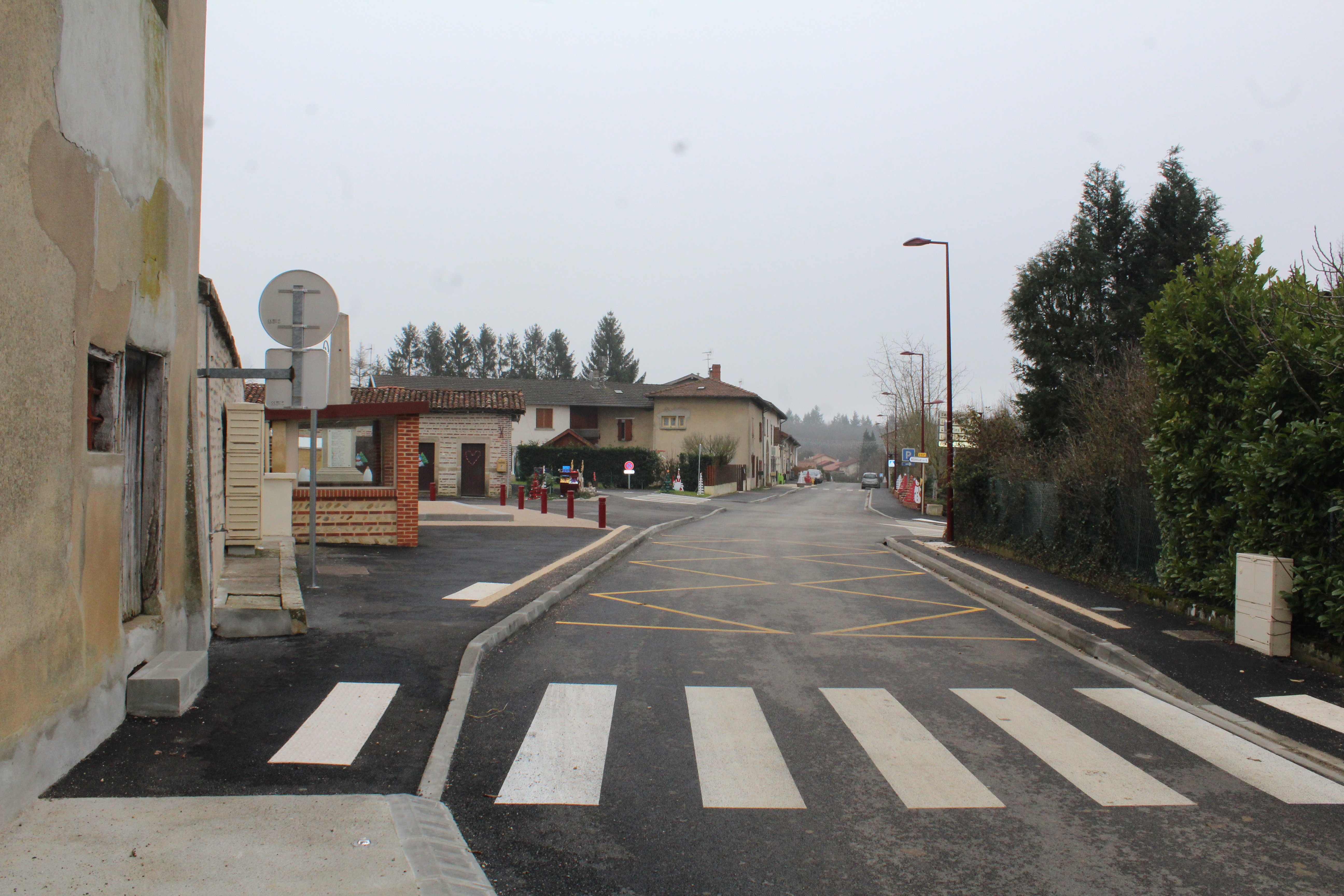 Rue principale à Chanoz-Châtenay.